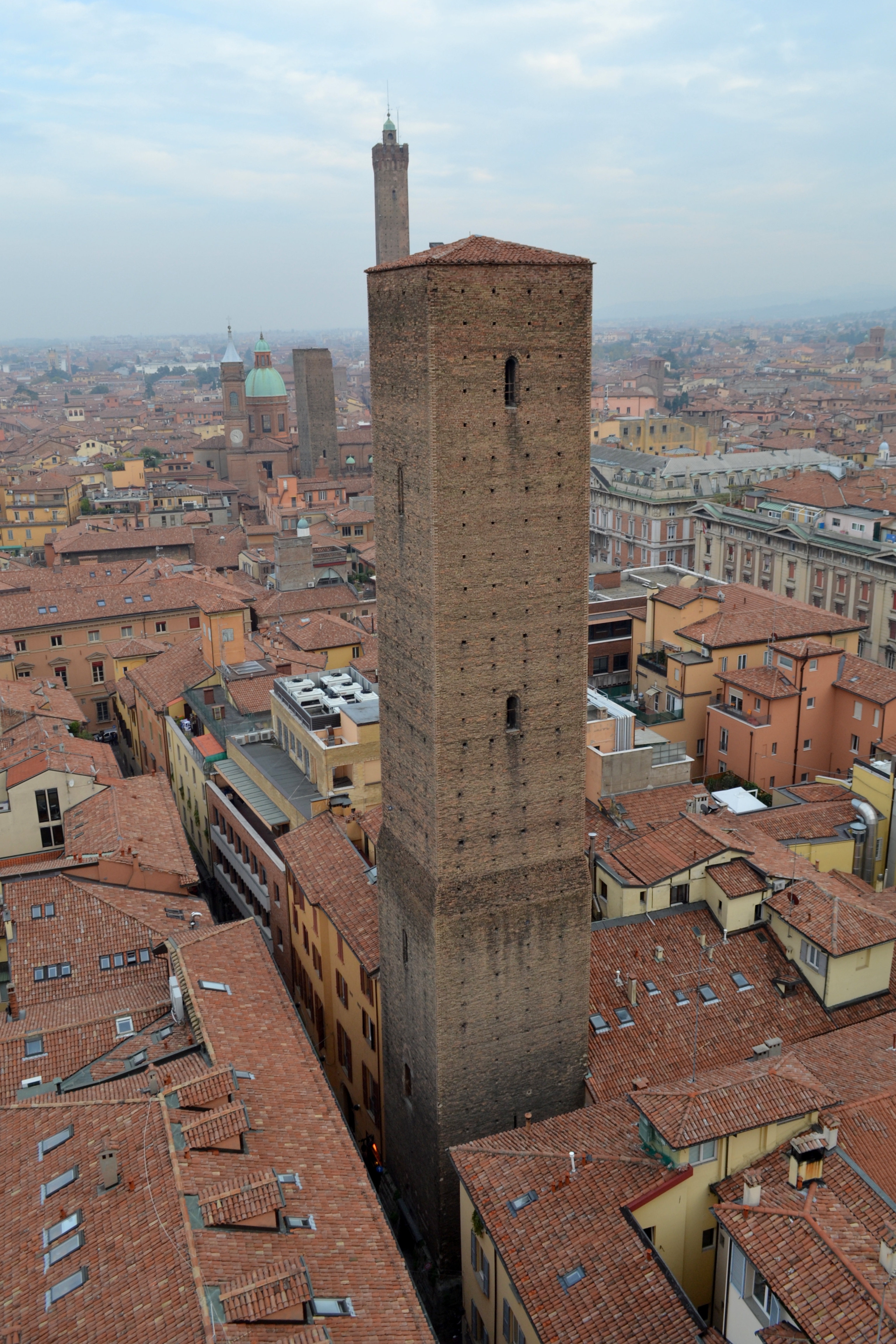 Torri di Bologna This is a photo of a monument which is part of cultural heritage of Italy.